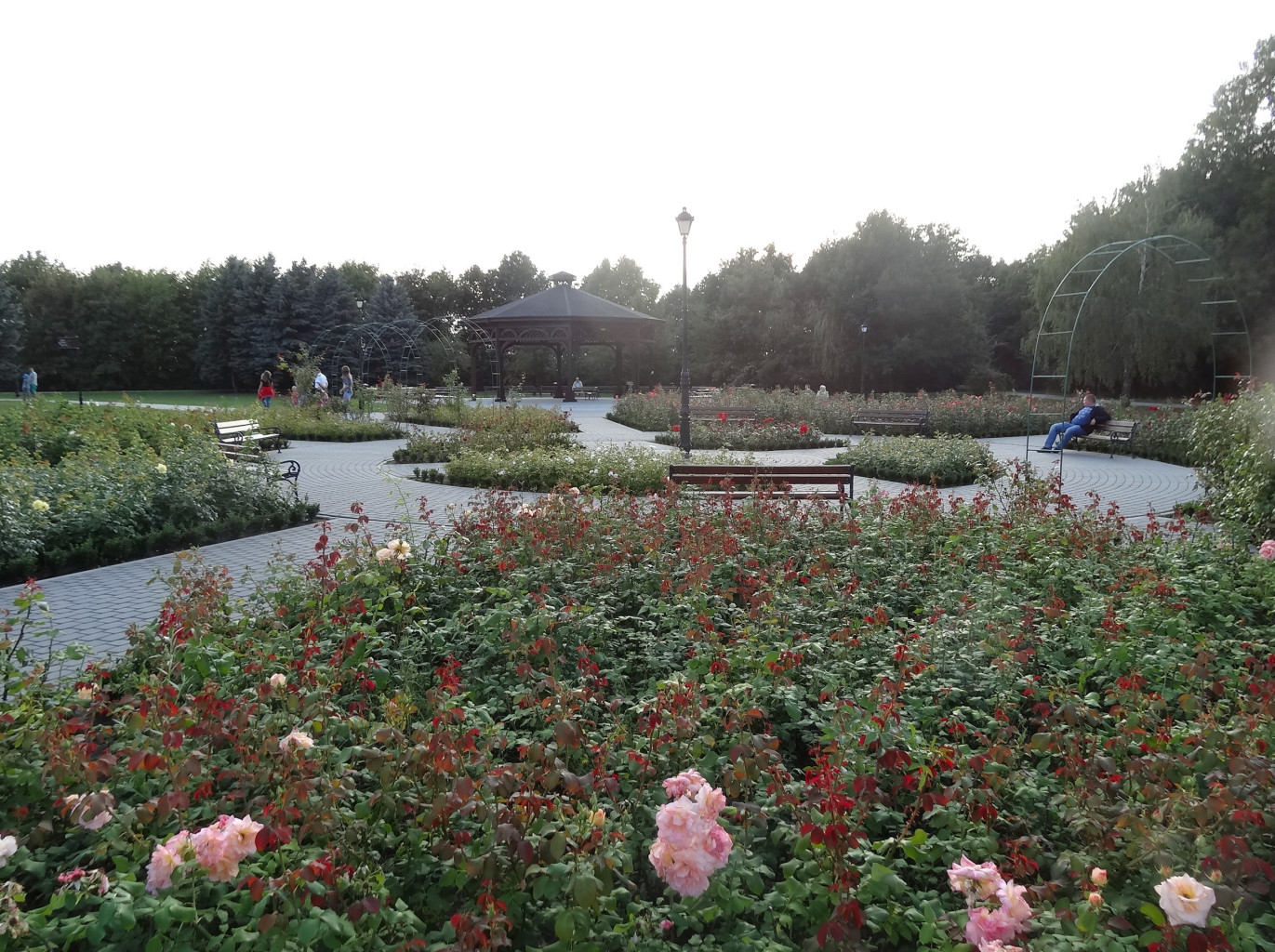 Nowa część parku Solankowego w Inowrocławiu